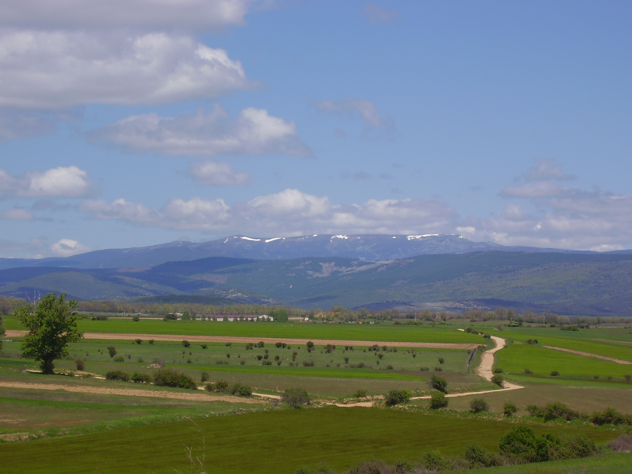 PARAJE DE LOS TAJONES BARRIO LAS CASAS SORIA, AL FONDO SIERRA DE CEBOLLERA, INCLUIDA EN LA RESERVA REGIONAL DE CAZA DE URBIÓN